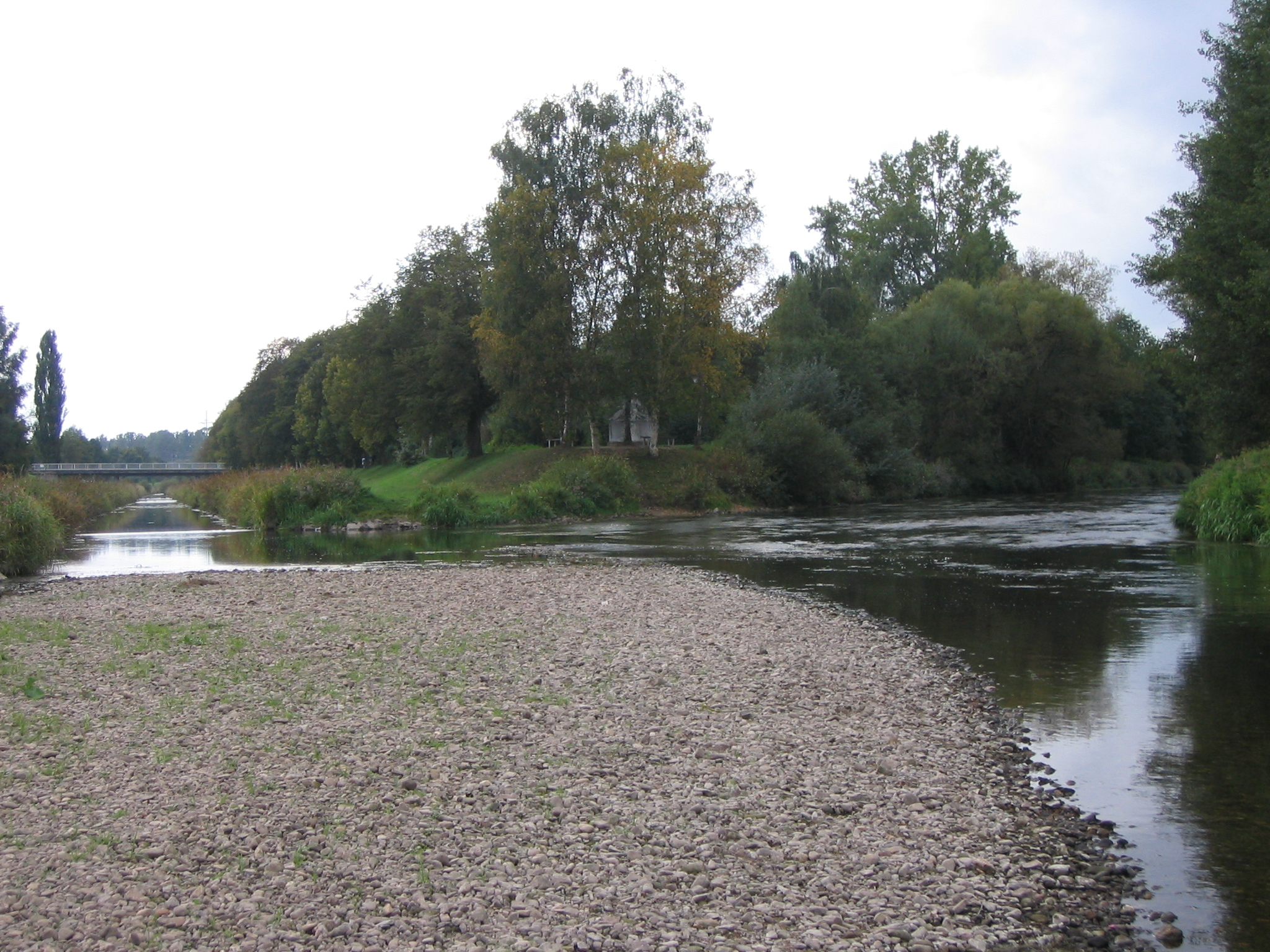 Zusammenfluss von Brigach (rechts oben) und Breg (links) zur Donau (rechts unten) bei Donaueschingen.